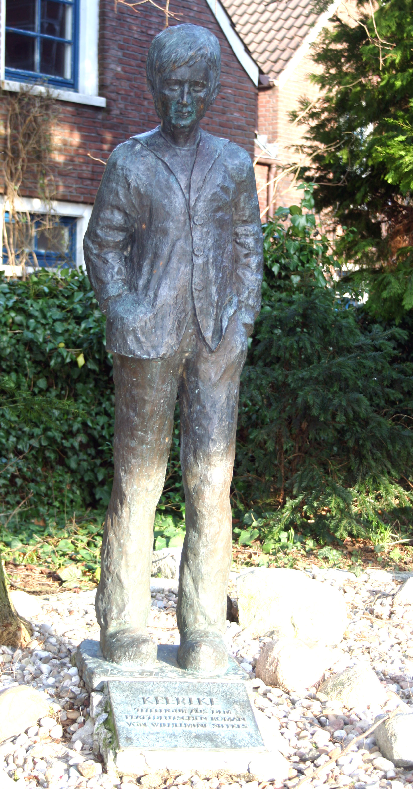 Skulptur der Romanfigur "Keerlke" der ostfriesischen Schriftstellerin Wilhelmine Siefkes im Innenhof des Rathauses von Leer (Ostfriesland).